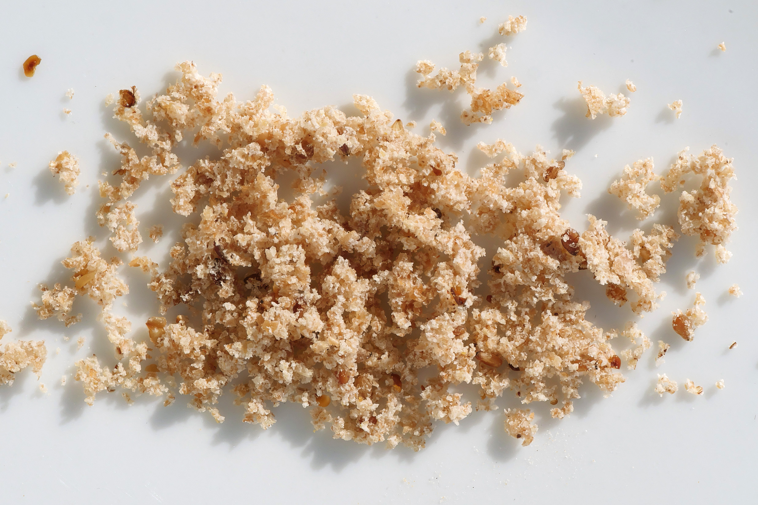 Krümel von Roggenvollkornbrot.